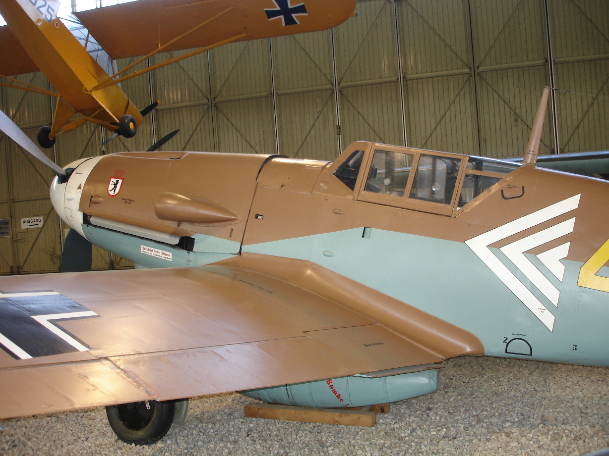 Gustav Rödel Bf 109-G2 remake in the Luftwaffenmuseum in Berlin